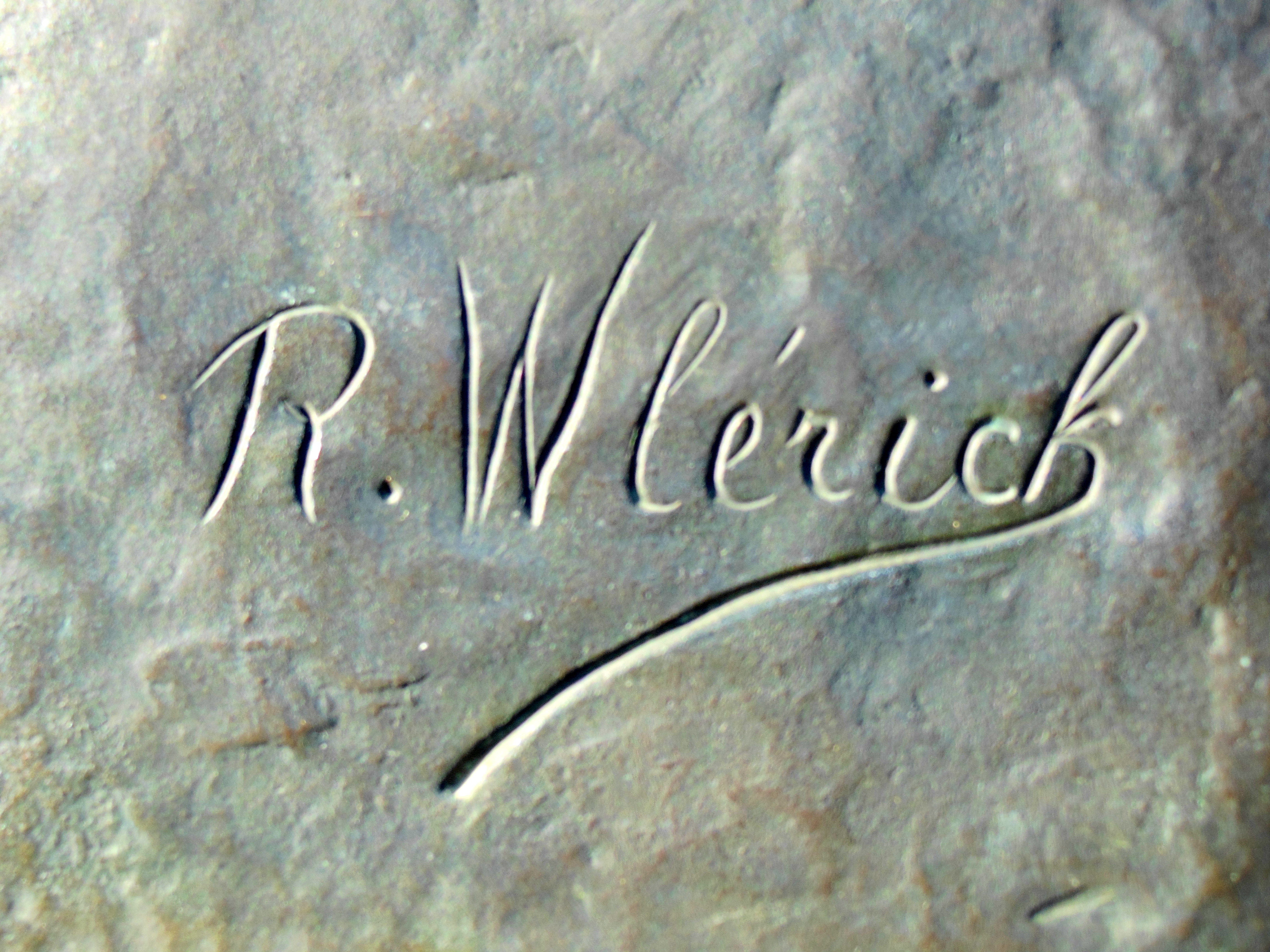 Robert Wlérick, signature d'une oeuvre.